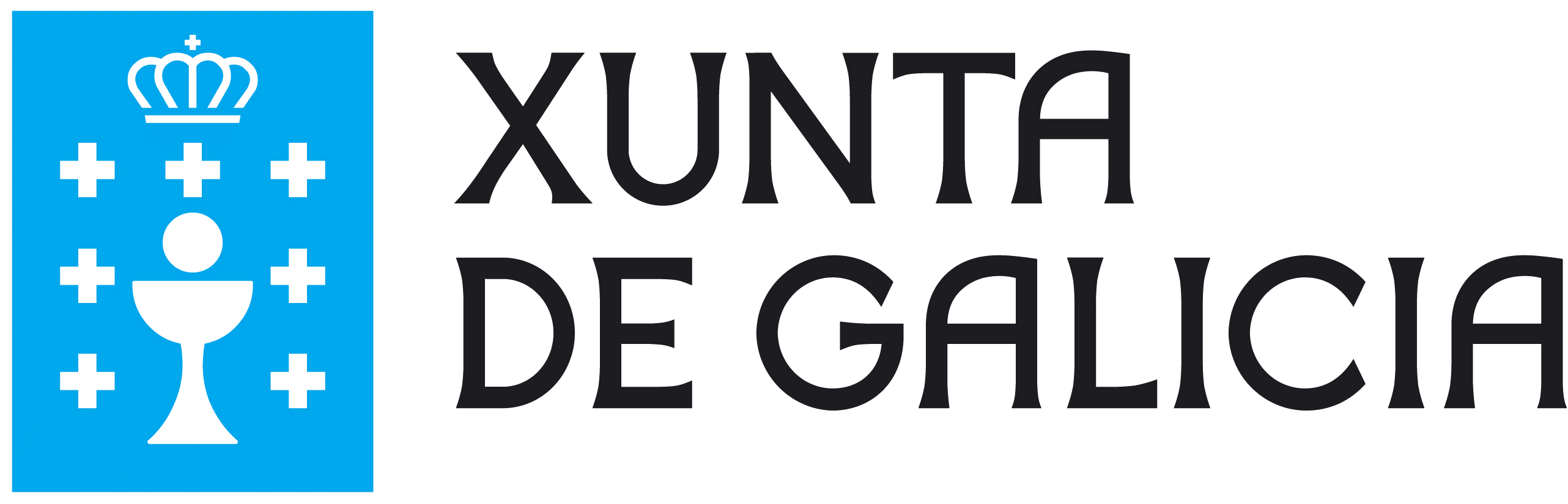 Escudo de Galicia, versión estilizada utilizada como logotipo de la Xunta de Galicia.